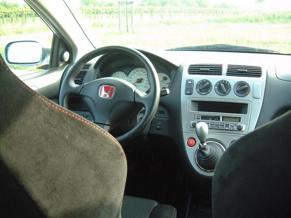 Sicht auf das Cockpit des Honda Civic Type R (EP3). Schön zu erkennen, die fahrerorientierte Platzierung der Schaltkulisse.